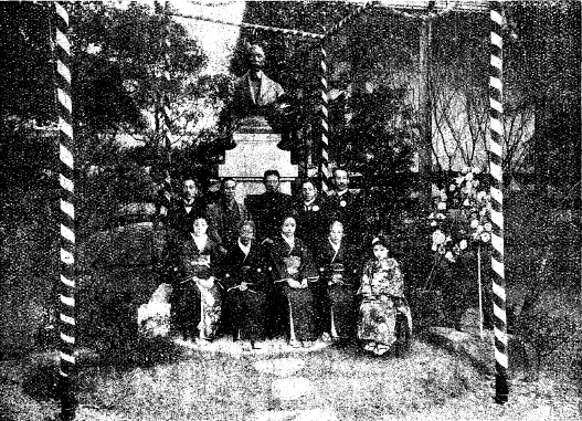 島邨俊一博士御家族及参列御親戚